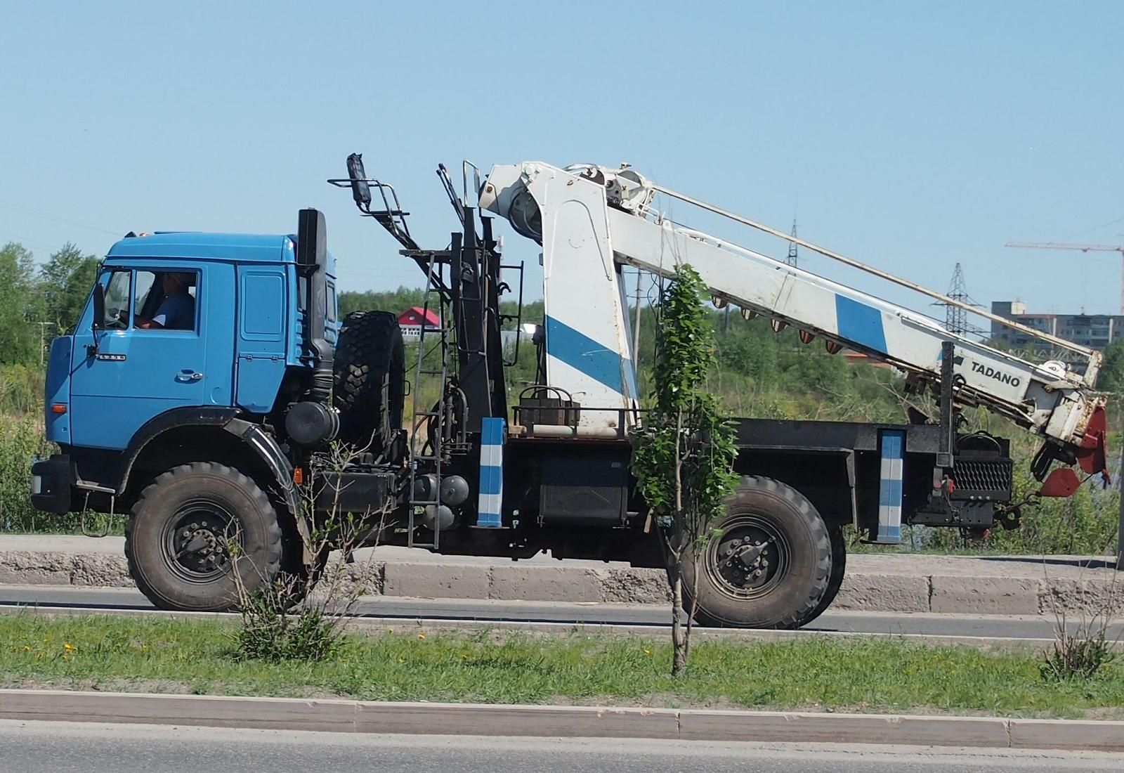 КАМАЗ-4326 с БКМ "Todano"